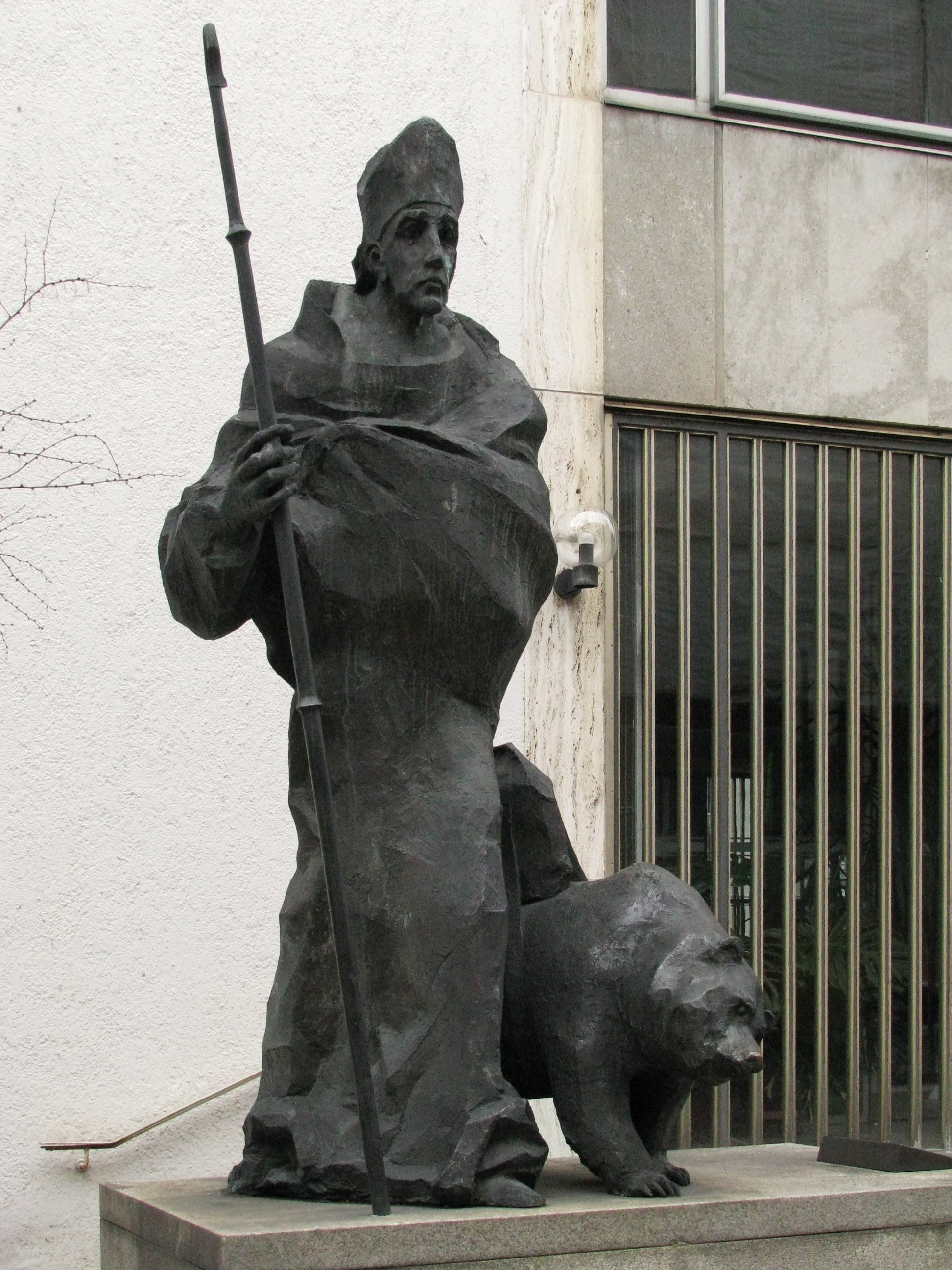 Bronzeplastik „Heiliger Korbinian mit dem Bären“ von Klaus Backmund; Standort: Maxburgstraße in München, vor dem Erzbischöflichen Ordinariat